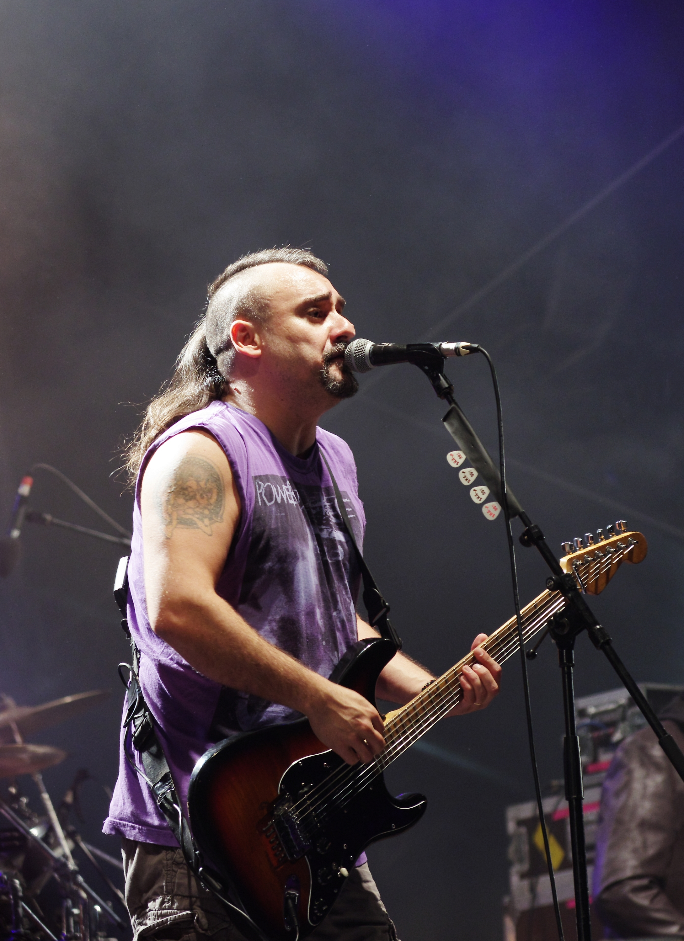 Ska-P beim Ruhrpott Rodeo 2013. Besetzung: Roberto Gañán Ojea (Pulpul) (Gesang, Rhythmus-Gitarre); Ricardo Degaldo de la Obra (Pipi) (Showmaster, Zweitstimme); José Miguel Redín Redín (Joxemi) (Lead-Gitarre); Julio César Sánchez (E-Bass); Alberto Javier Amado (Kogote) (Keyboard); Luis Miguel García (Luismi ) (Schlagzeug, Perkussion); Garikoitz Badiola (Gari) (Posaune); Alberto Iriondo (Txikitin) (Trompete)